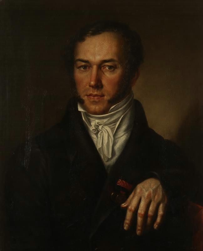 Портрет Александра Прокофьевича Филисова